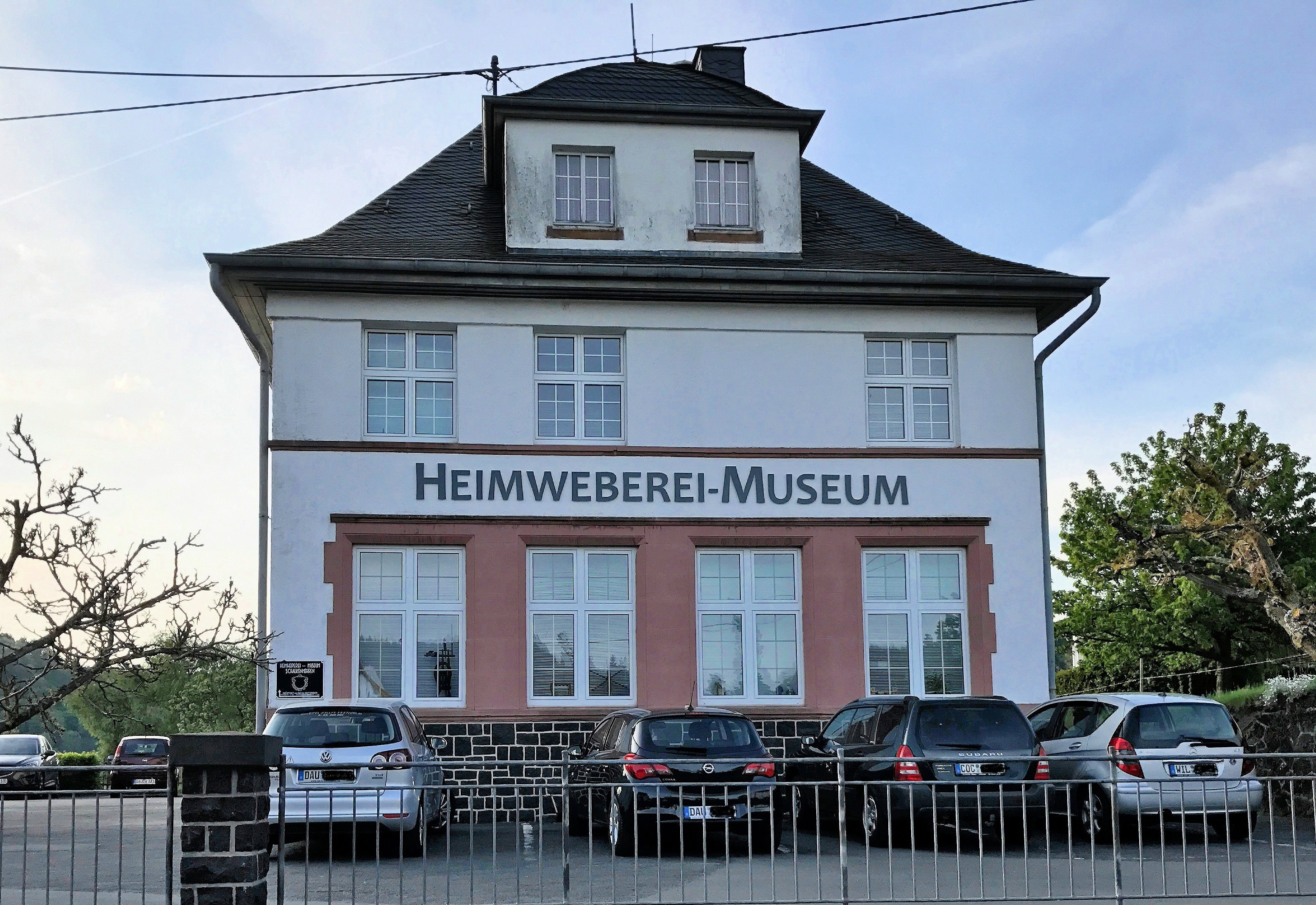 Heimweberei-Museum in Schalkenmehren